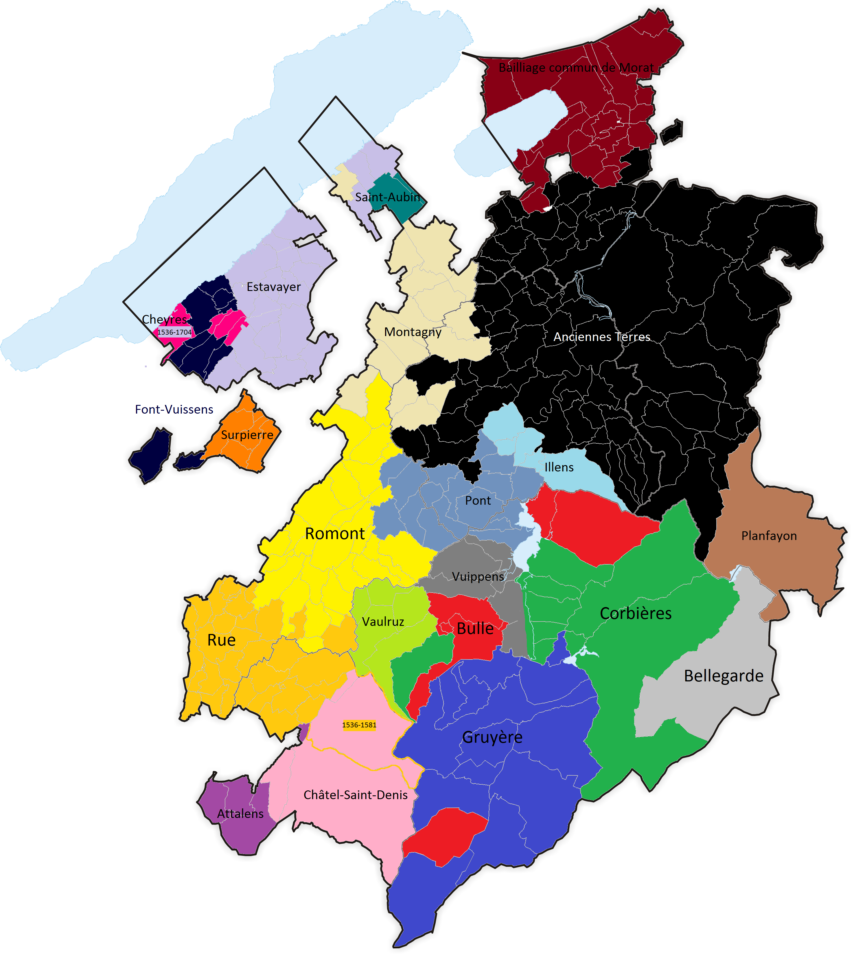 Carte des bailliages fribourgeois, y compris le bailliage commun de Morat.